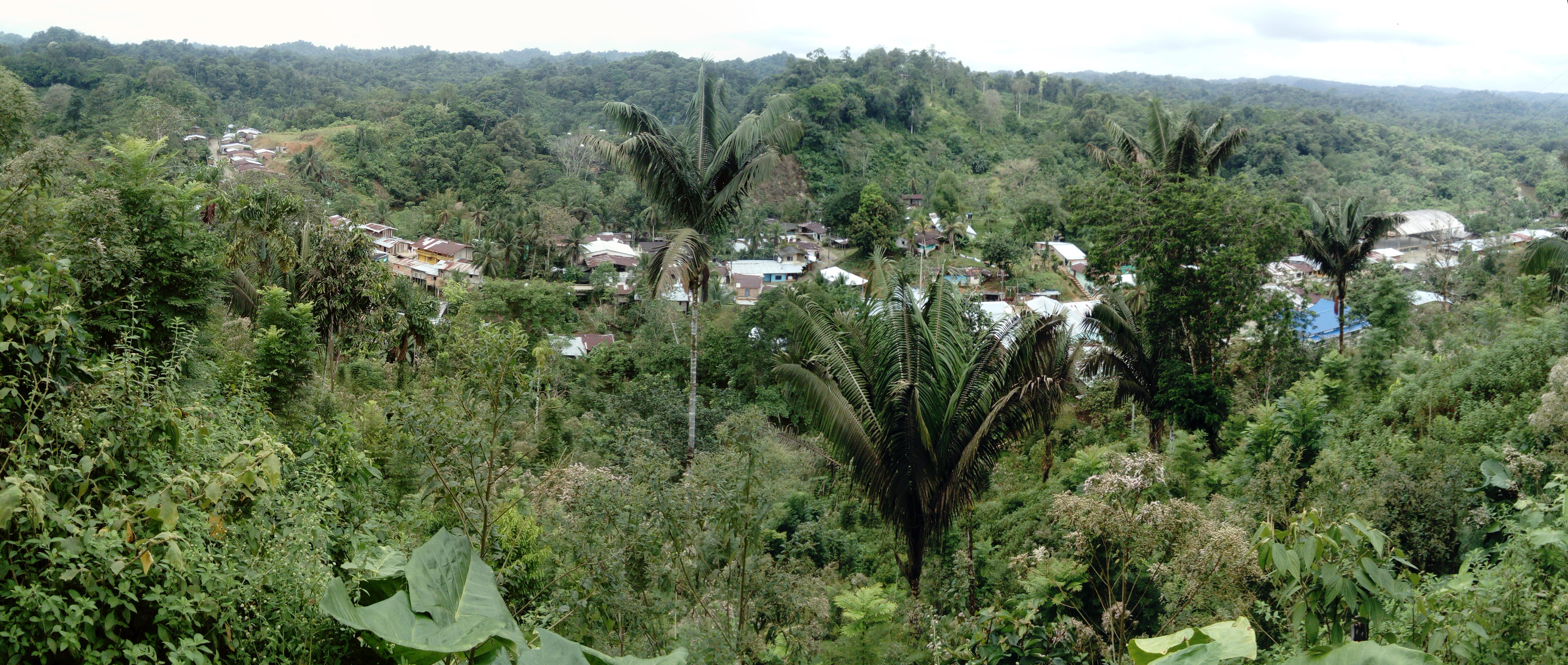 Corregimiento de Pie de Pepé, municipio de Medio Baudó, Chocó, Colombia